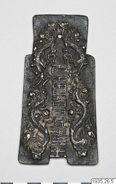 1935.26.0005 Amulettmynt av brons i form av spadmynt. På ena sidan inskription omgiven av fyra drakar, på andra sidan stiliserade tecken. China.